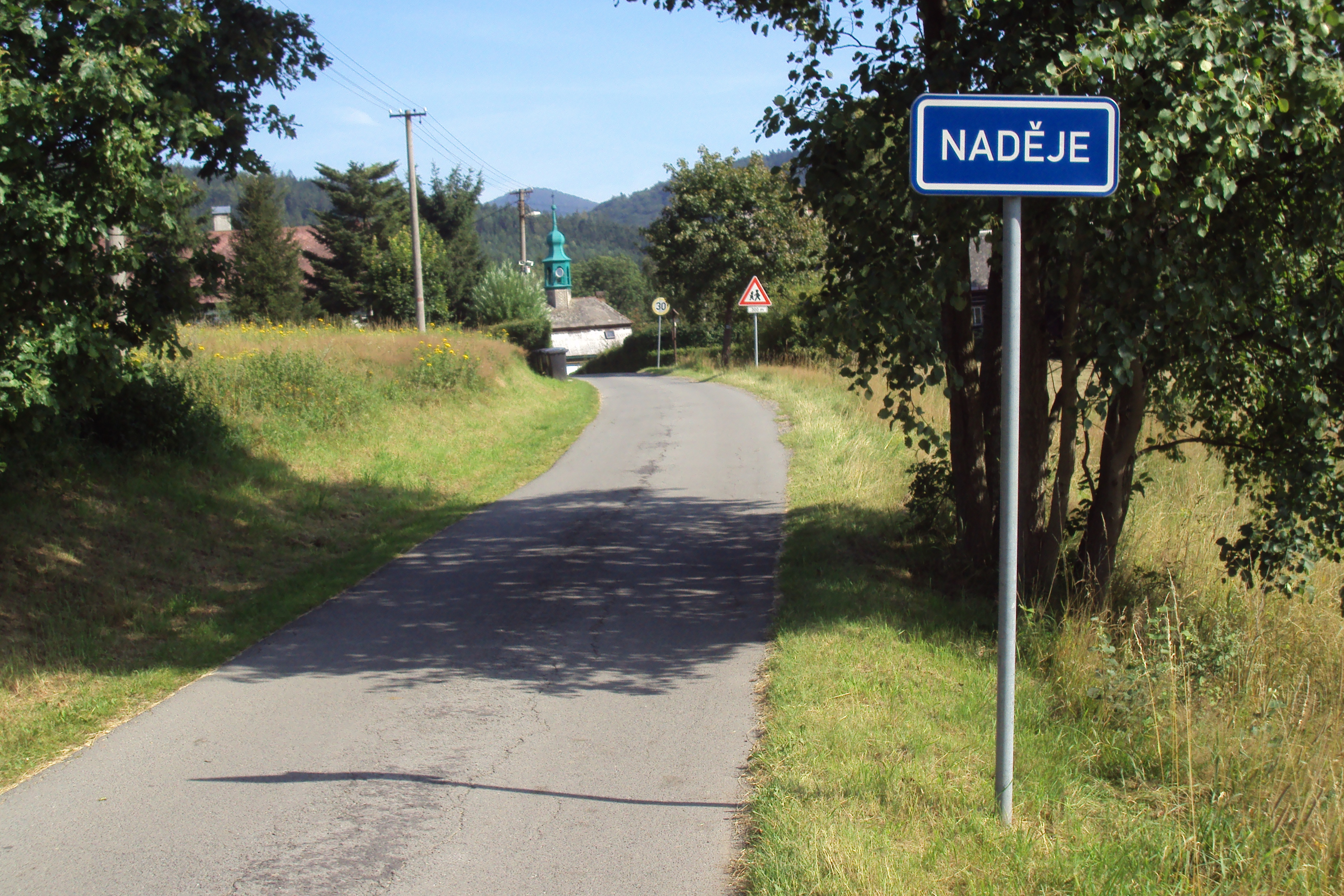 Začátek vesničky z jihu, od obce Trávník